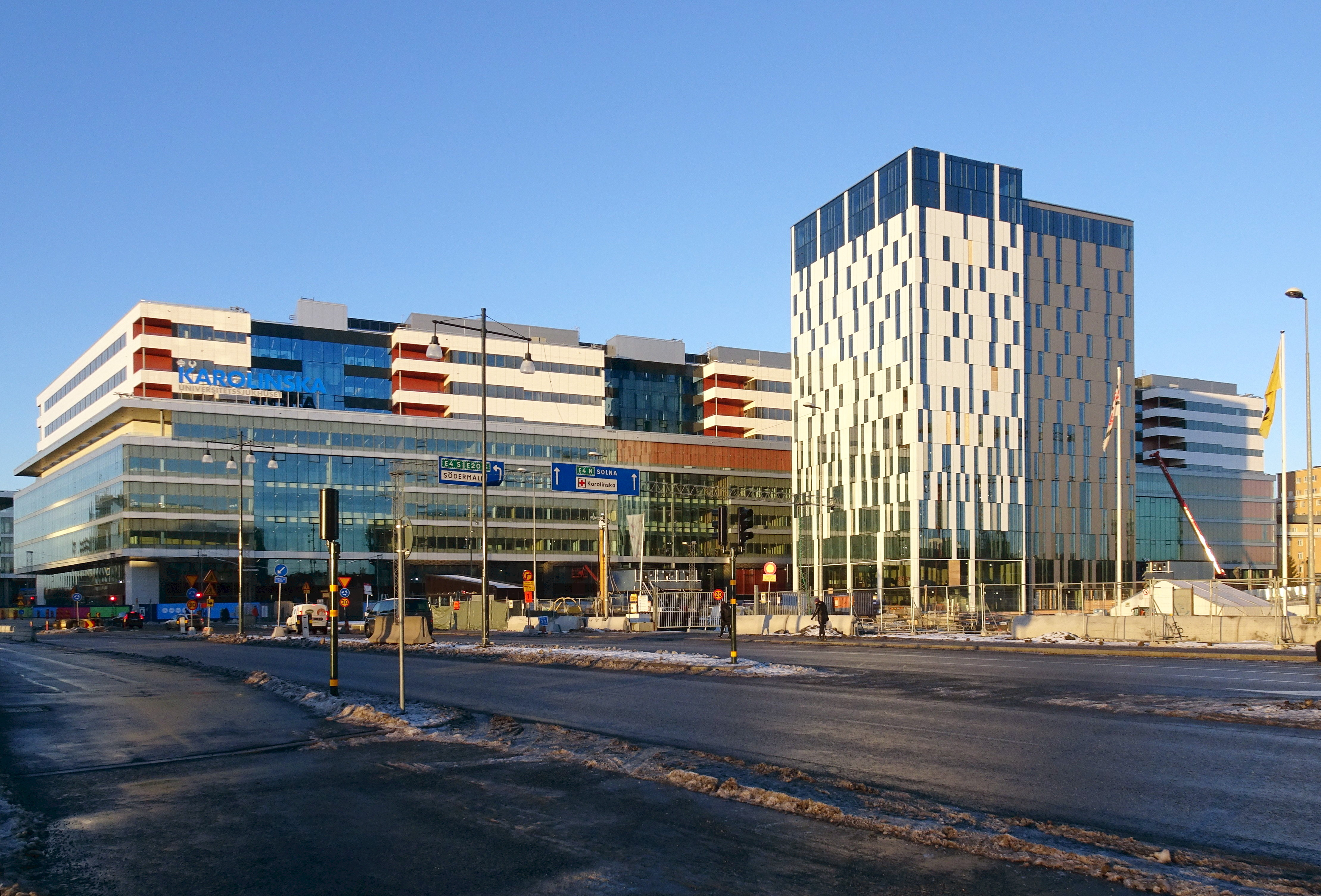 Nya Karolinska sjukhuset vy från Solnabron